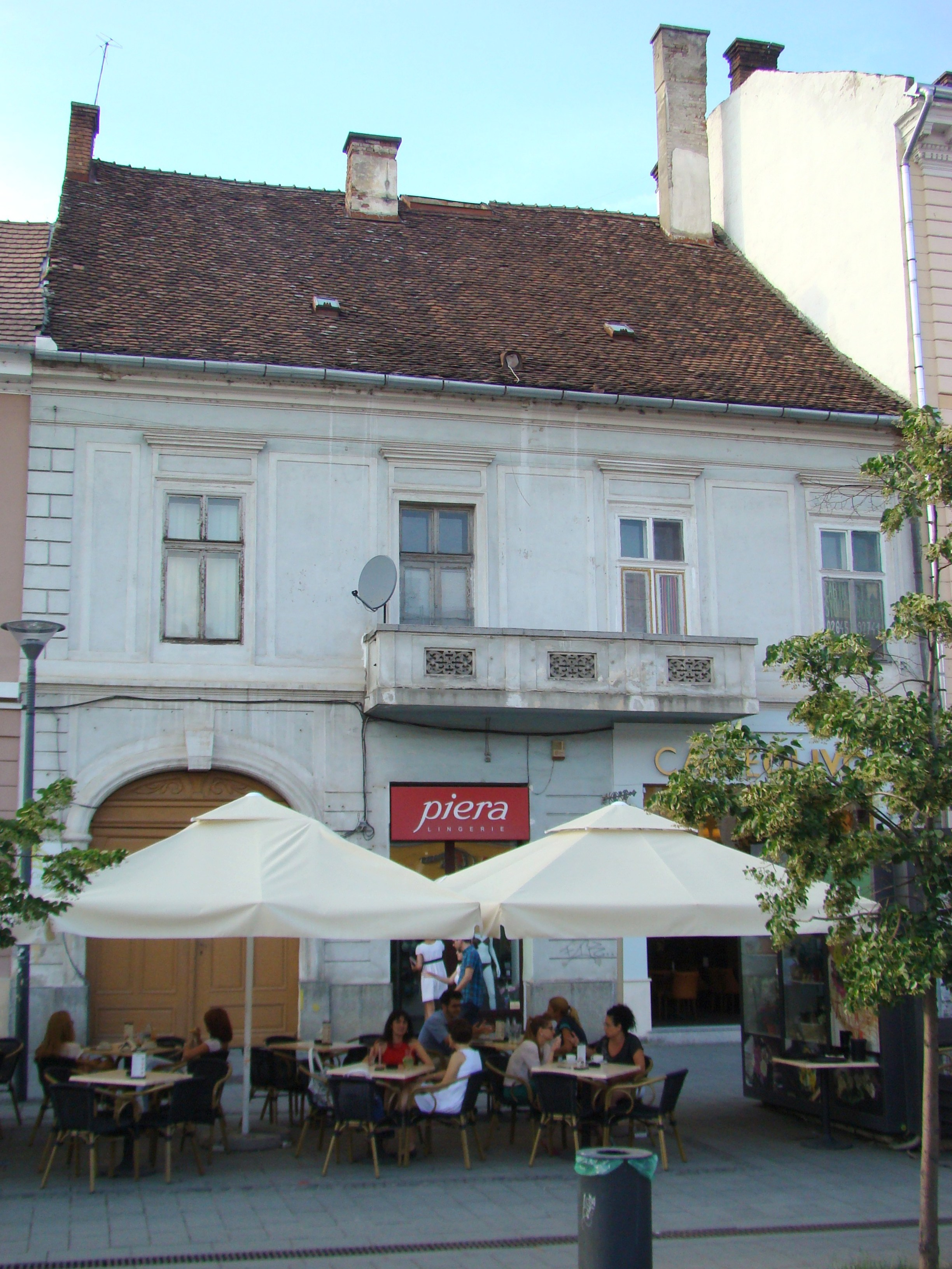 Clădire monument istoric, Bd.Eroilor, nr. 7